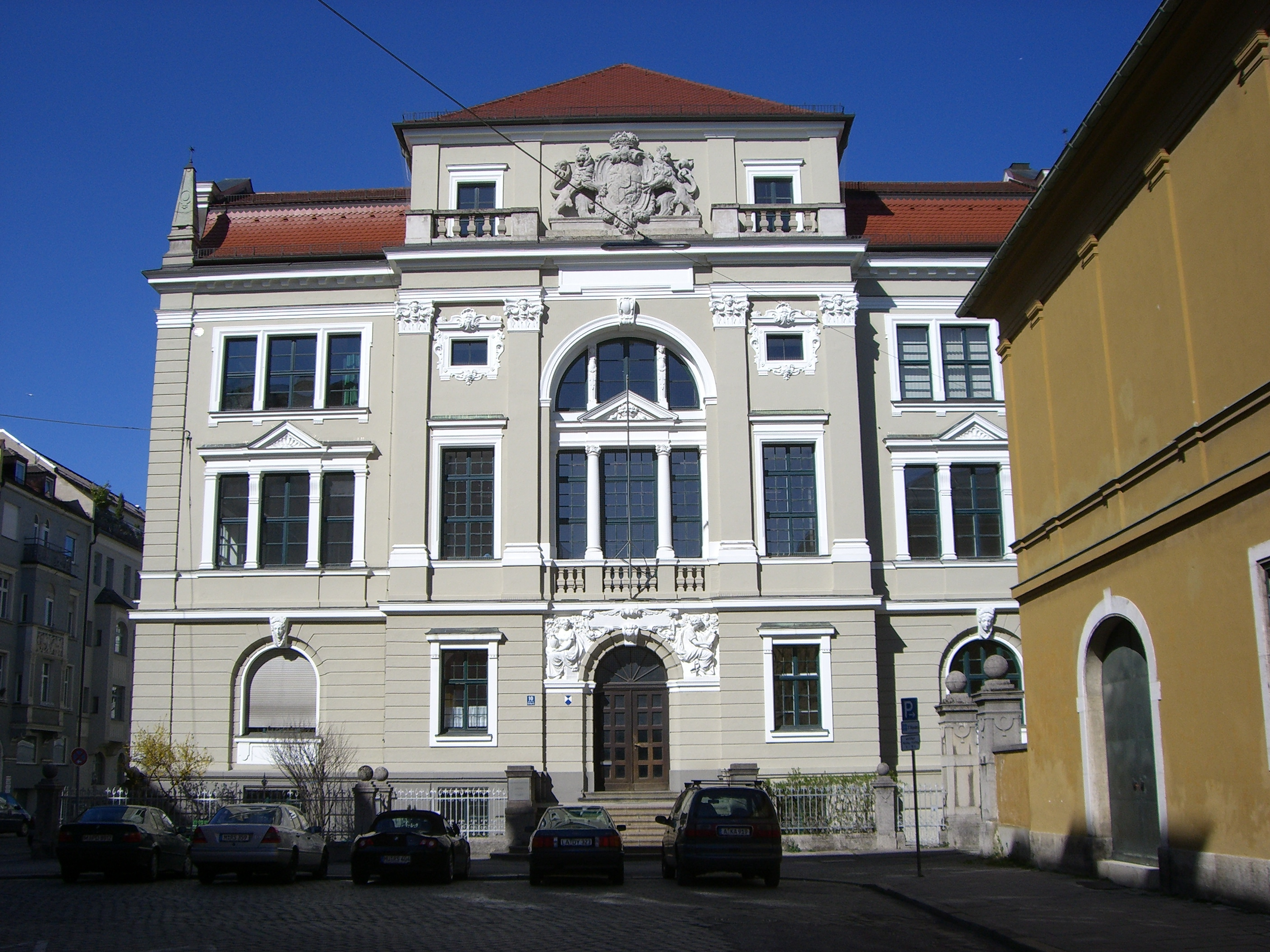 München: Paläontologisches Museum